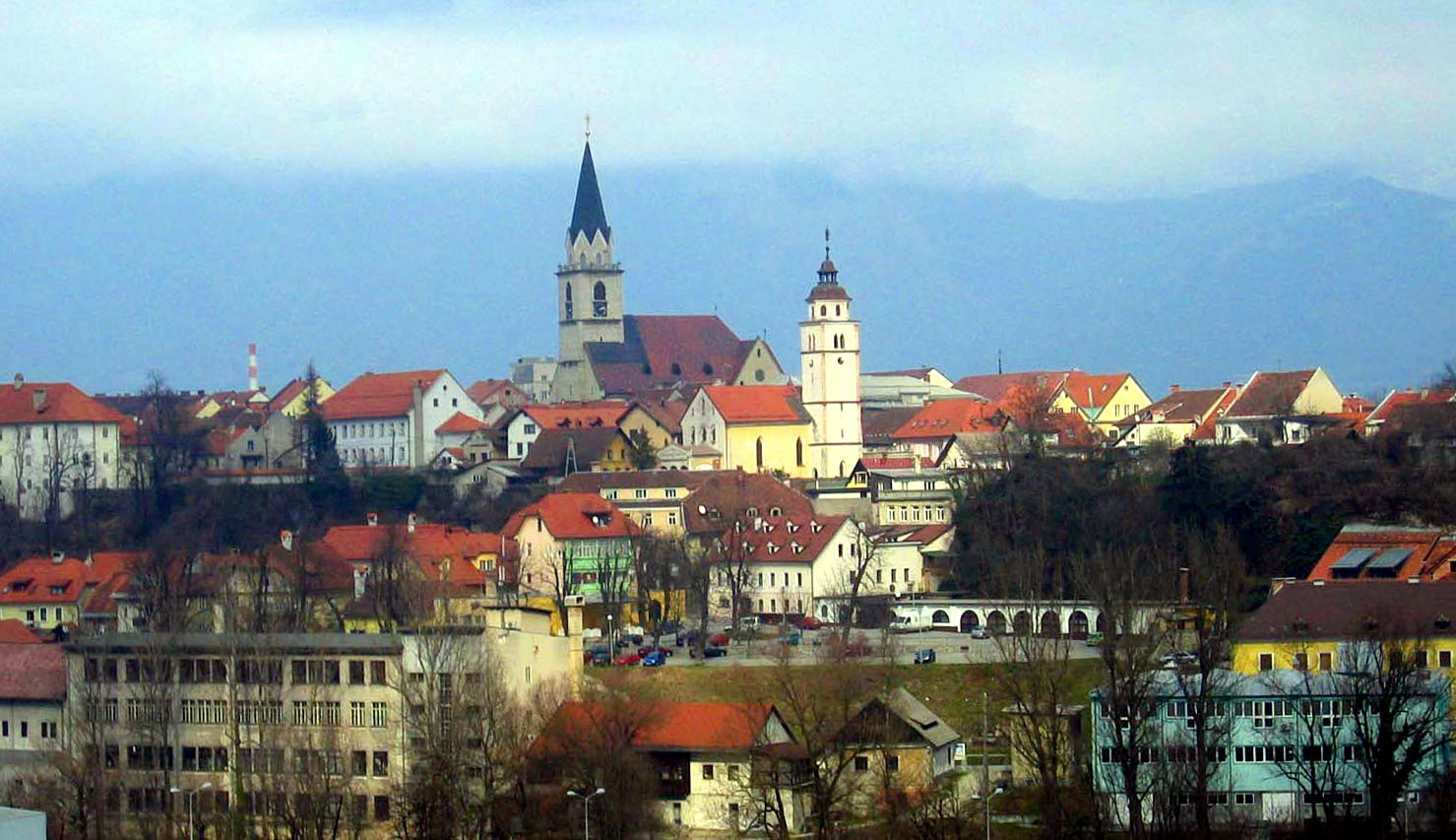 Kranj, city in Slovenia photo:Ziga 15:08, 26 February 2007 (UTC)